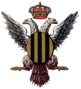 Stemma Famiglia Alliata o Agliata